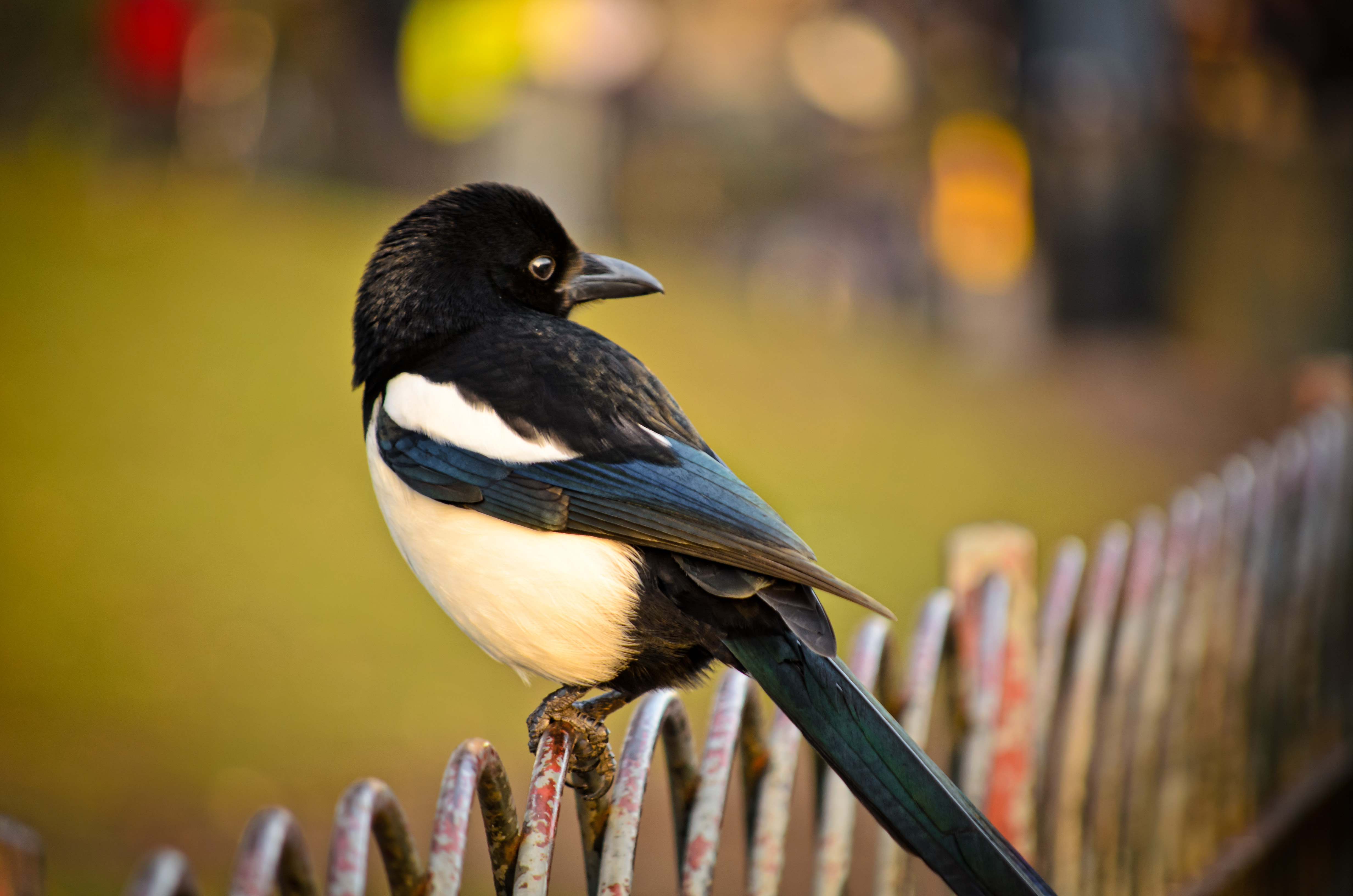 Pica pica, Common Magpie